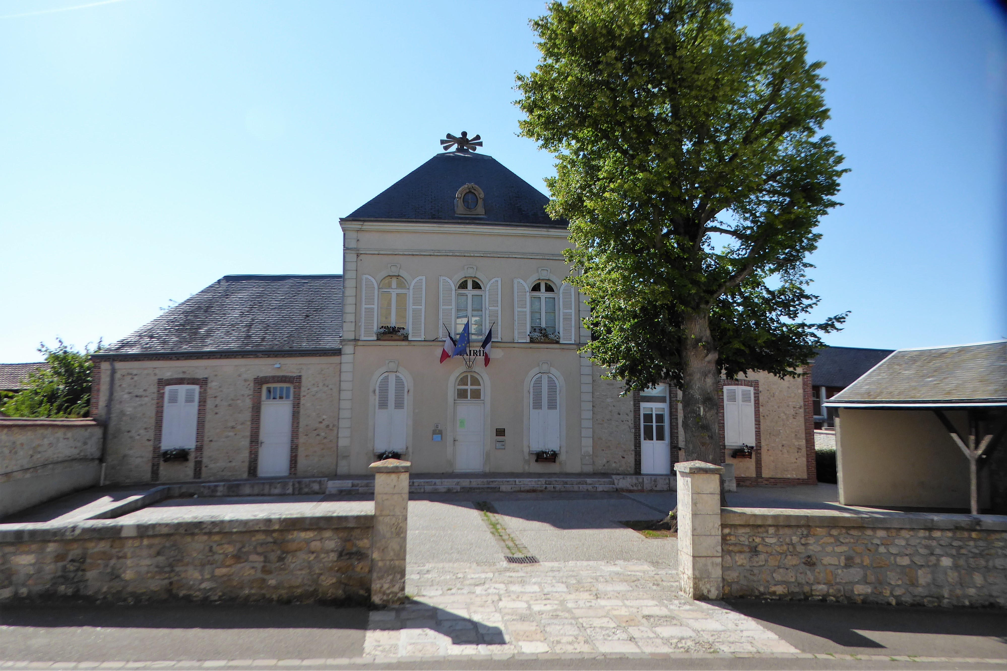 mairie, Dammarie, Eure-et-Loir (France).